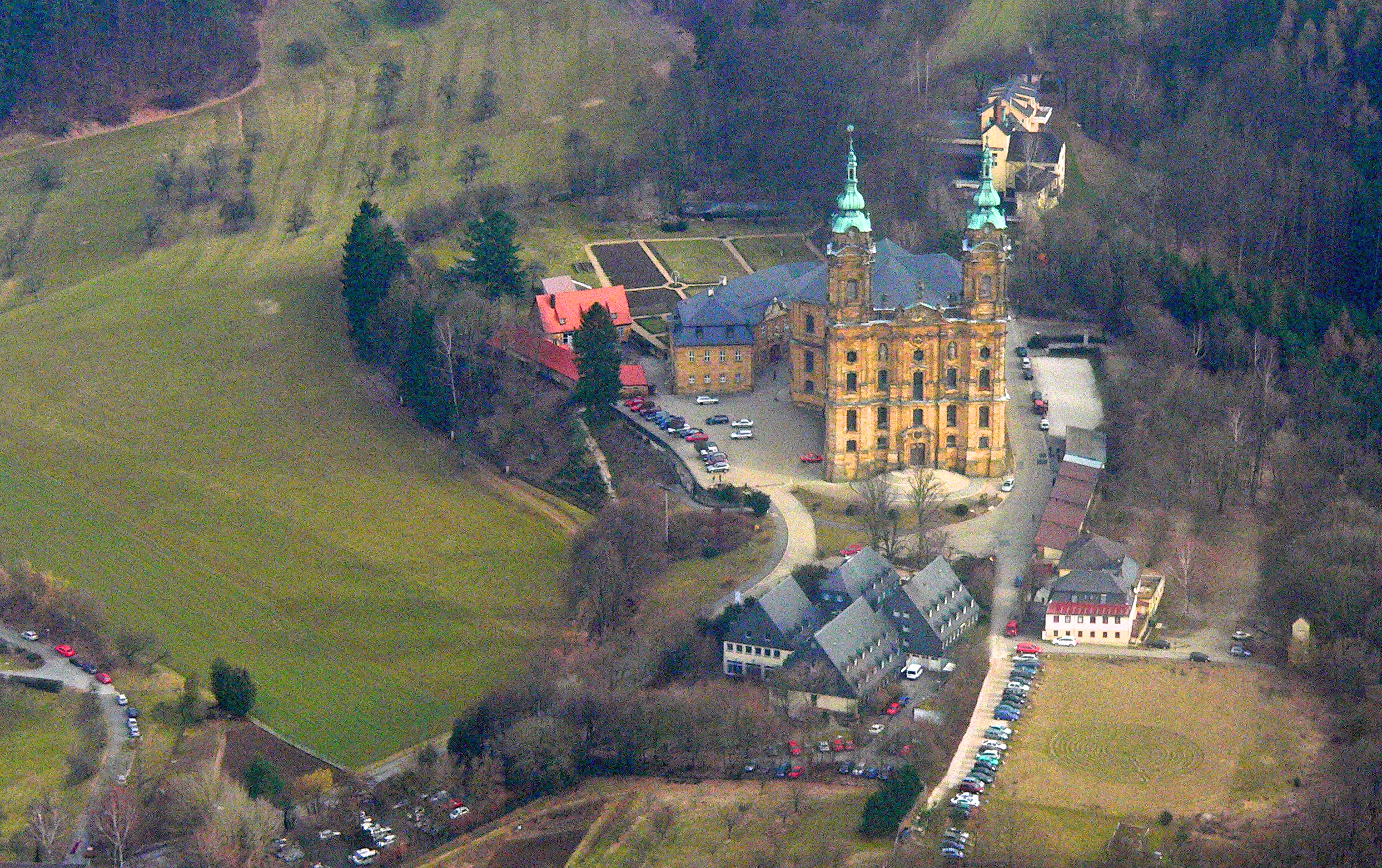 Klosterkirche Vierzehnheiligen bei Staffelstein, Oberes Maintal, Bayern